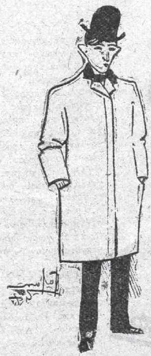 Künstlerkarikatur, Teil eines Kohlenstiftzyklus für die griechische Literaturzeitung Estia